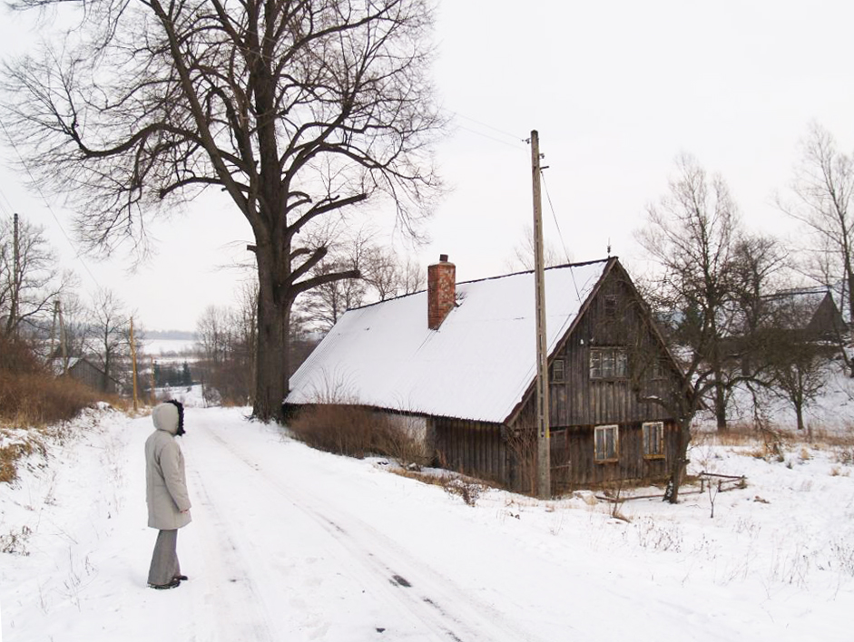 Wyszki (dolnośląskie). Dom rodzinny poety R.Kargera